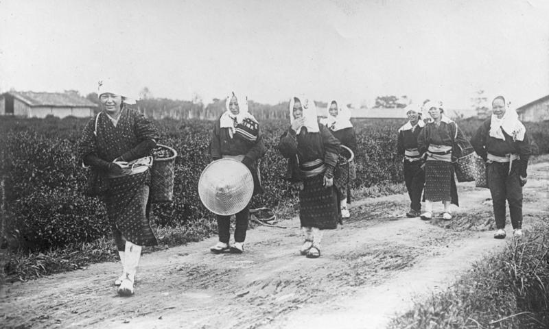 Friedliches China ! Keine Flüchtlinge, sondern vom Krieg verschonte chinesische Landarbeiterinnen auf dem Wege zur Tee-Plantage fern vom Kriegsschauplatz im Innern Chinas.